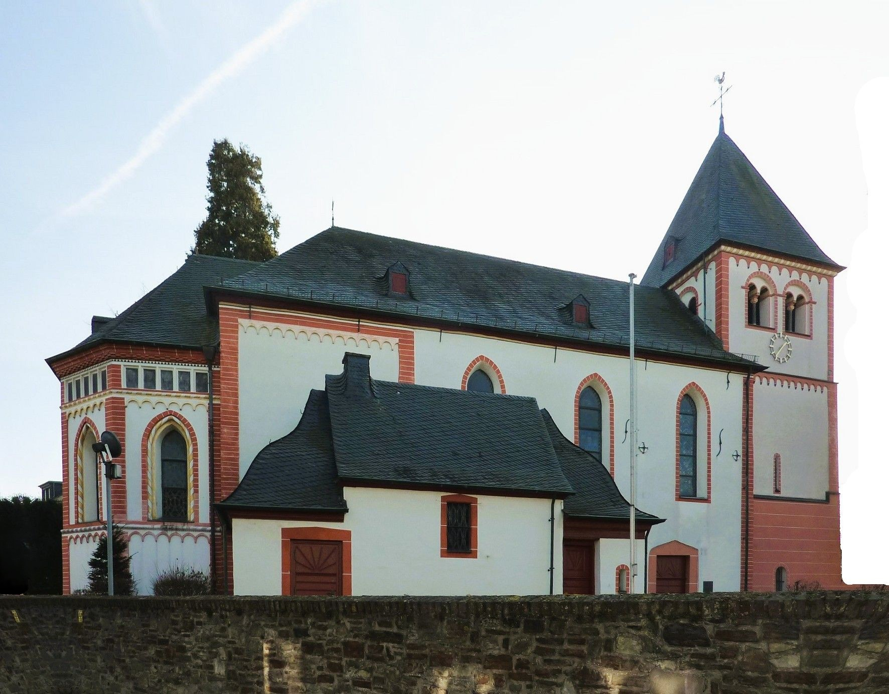 Katholische Pfarrkirche St. Peter, Lüftelberg